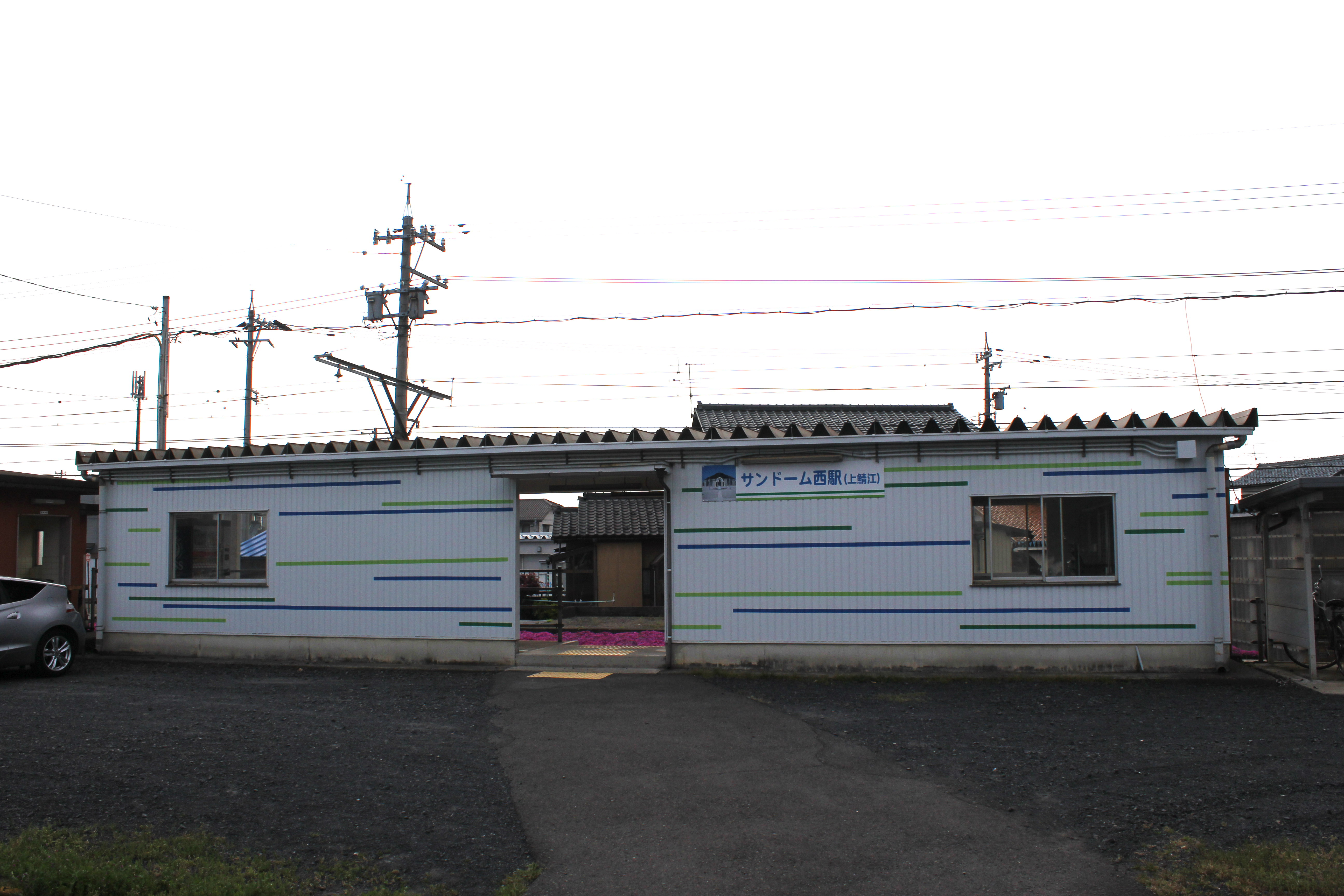 サンドーム西駅（福井鉄道）